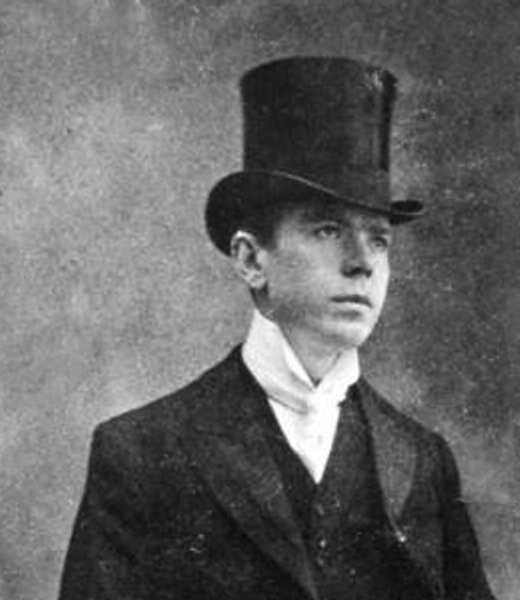 Aleksander Promet